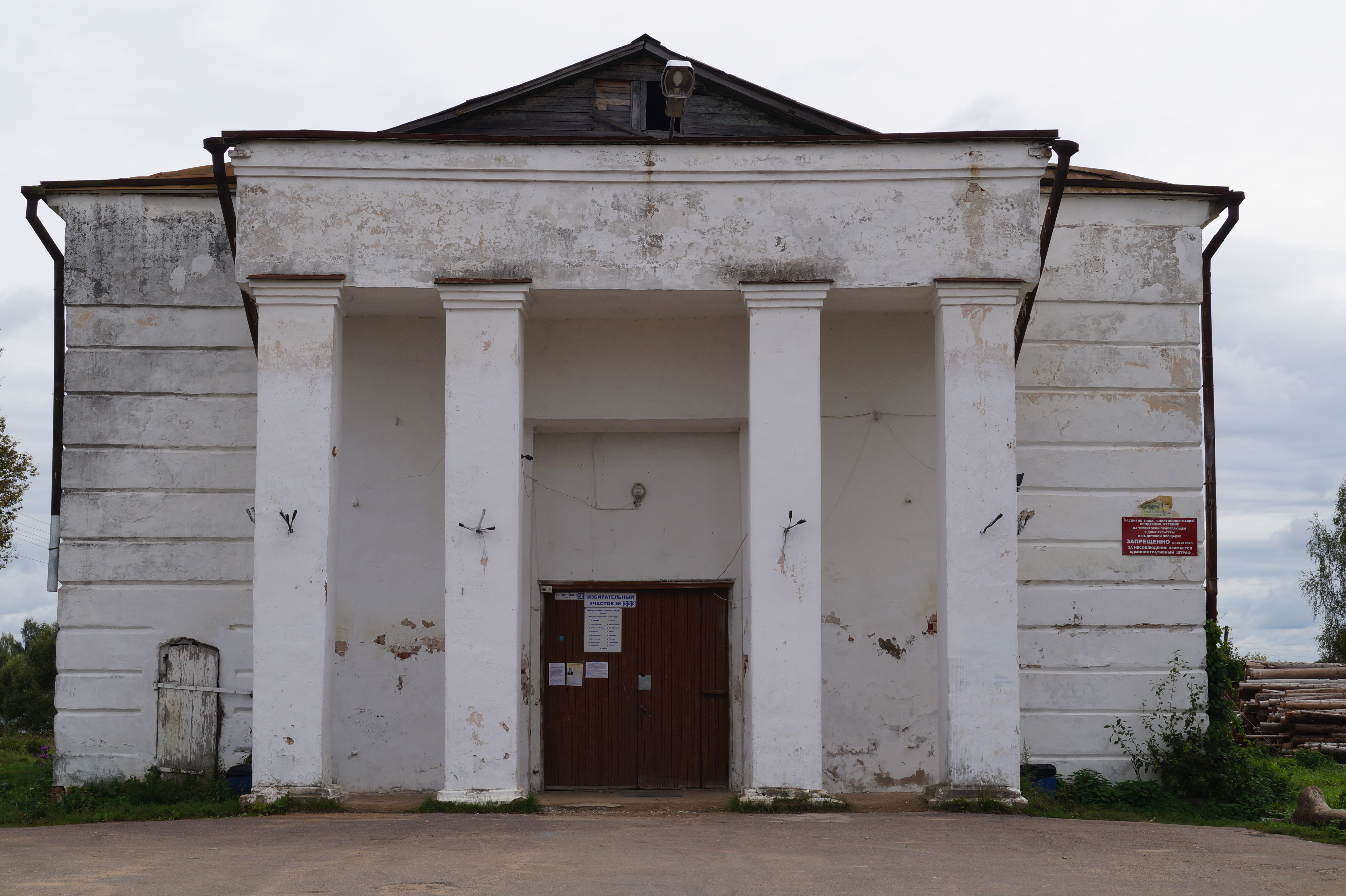 Троицкая церковь: Нерль, Калязинский район, Тверская область